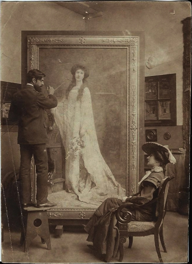 Auguste leroux dans son atelier